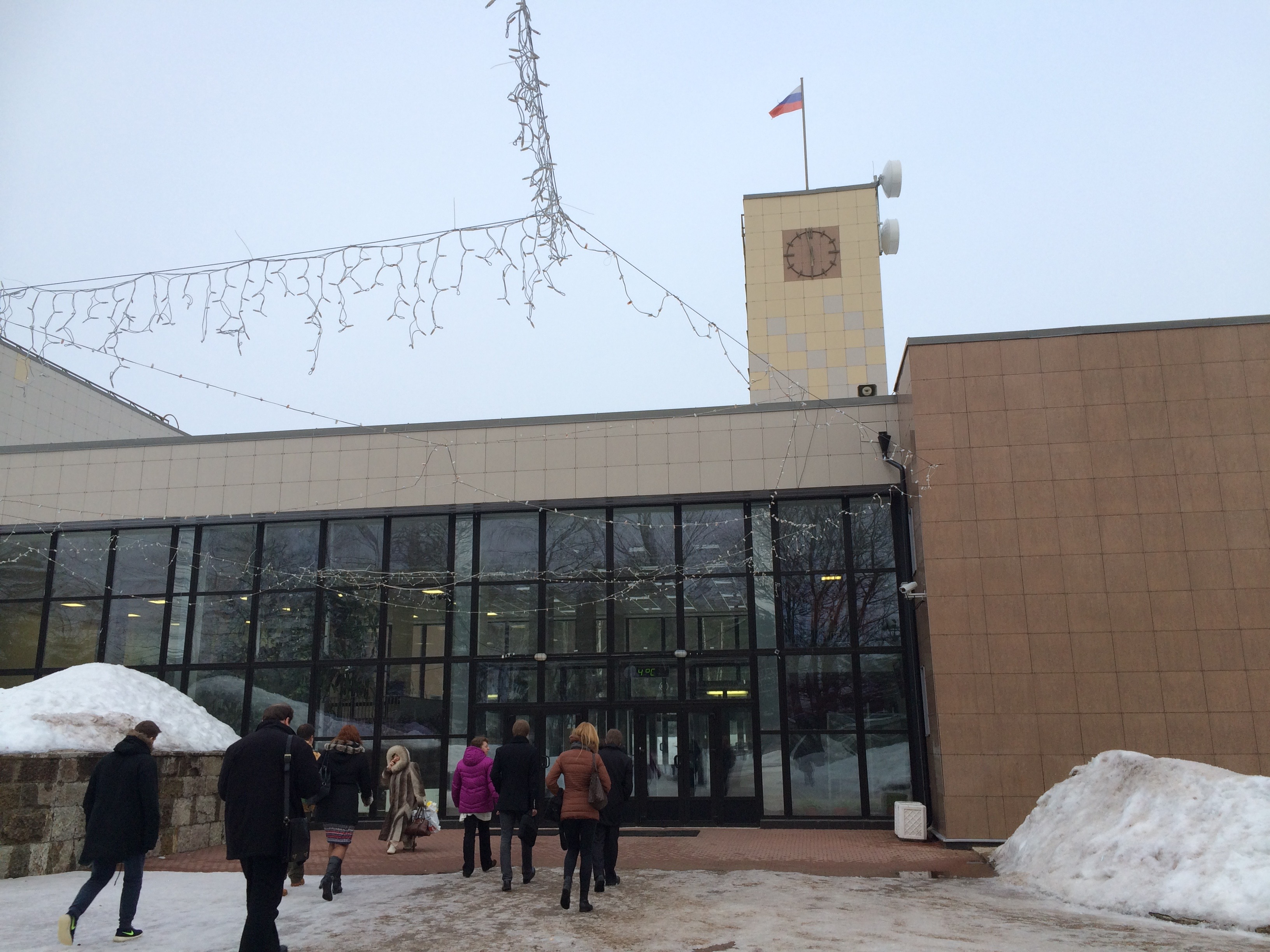 Зеркальный